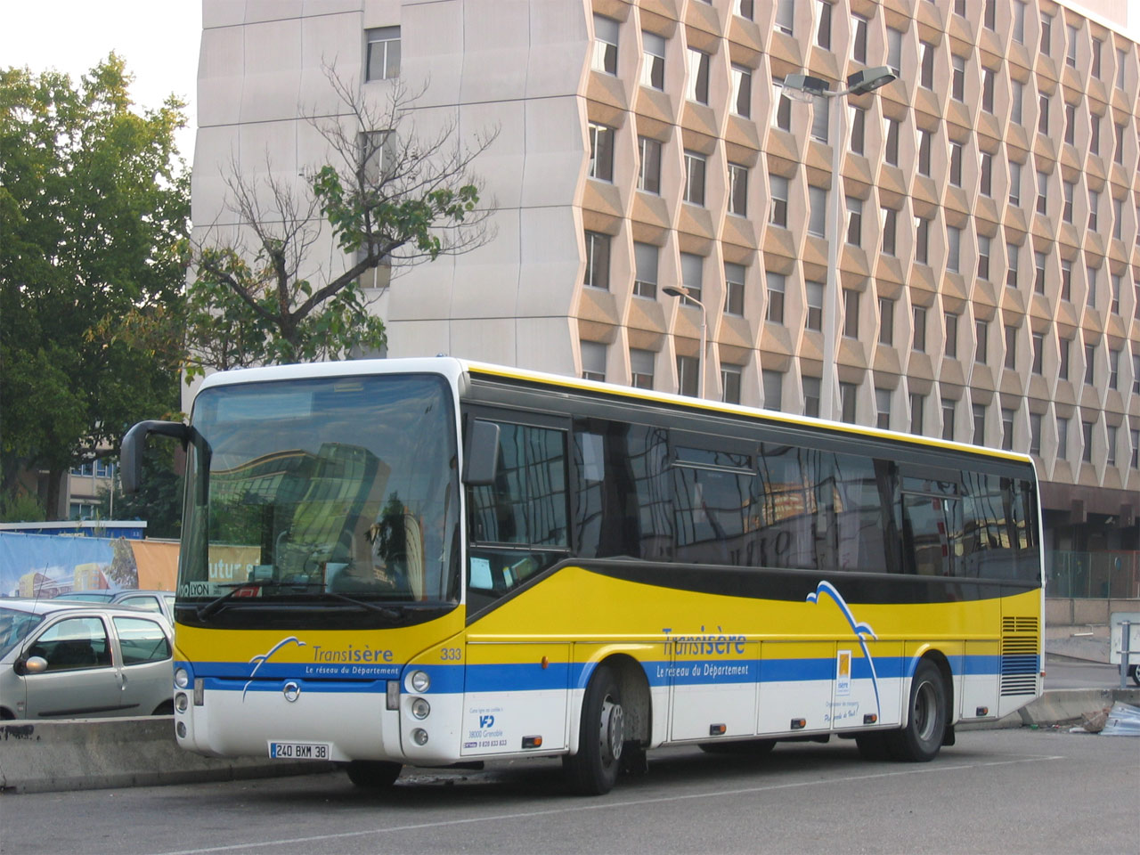 Irisbus Arès 12